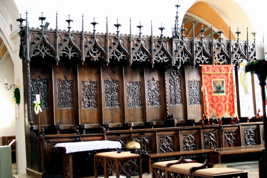 Chorgestuehl/Kastulusmünster Moosburg